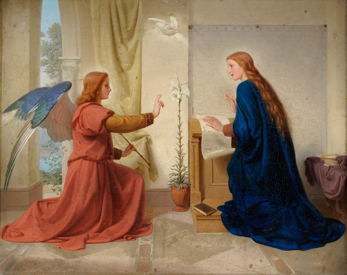 Verkündigung. Signiert. Datiert: Düsseldorf 1862. Öl auf Leinwand, 50 x 65 cm